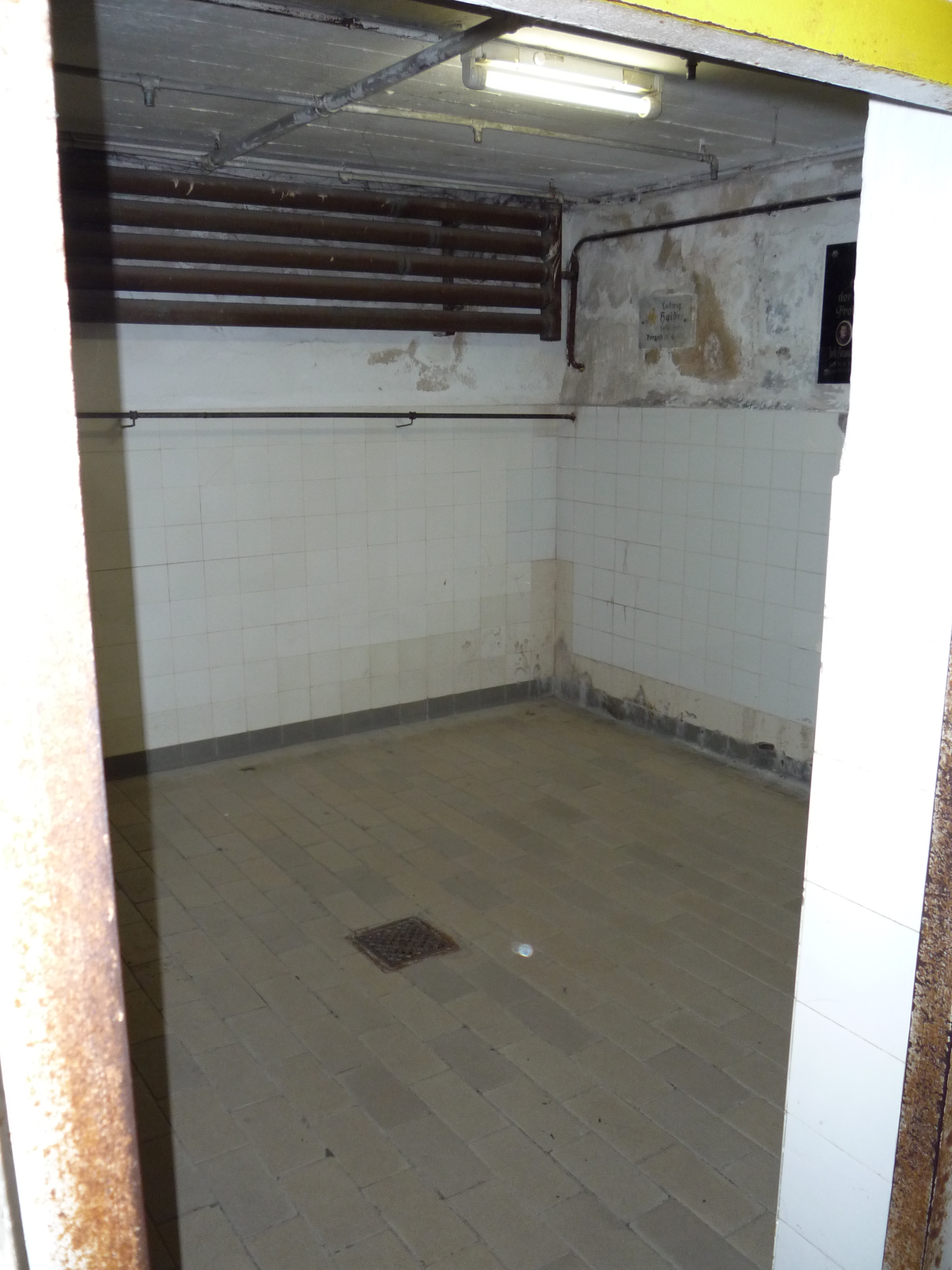 Chambre à gaz (vue depuis l'entrée) du camp de concentration de Mauthausen Le camp de concentration de Mauthausen n'était pas un camp d'extermination, bien que des exécutions s'y déroulaient aussi. De ce fait, la chambre à gaz du camp ne mesurait qu'environ 5 m2. Cammouflée en salle de douche, la chambre à gaz était installée au sous-sol de l'infirmerie. D'après les informations du commandant SS martin Roth qui commandait les opérations de crémation, les premières victimes ont été asphyxiées au gaz Zyklon B au printemps 1942. le dernier massacre au gaz eu lieu le 28 avril 1945. Le 29 avril 1945 les installations techniques (le réservoir à gaz, les conduites, le ventilateur, etc) furent enlevées et la chambre à gaz mise dans l'état actuel.